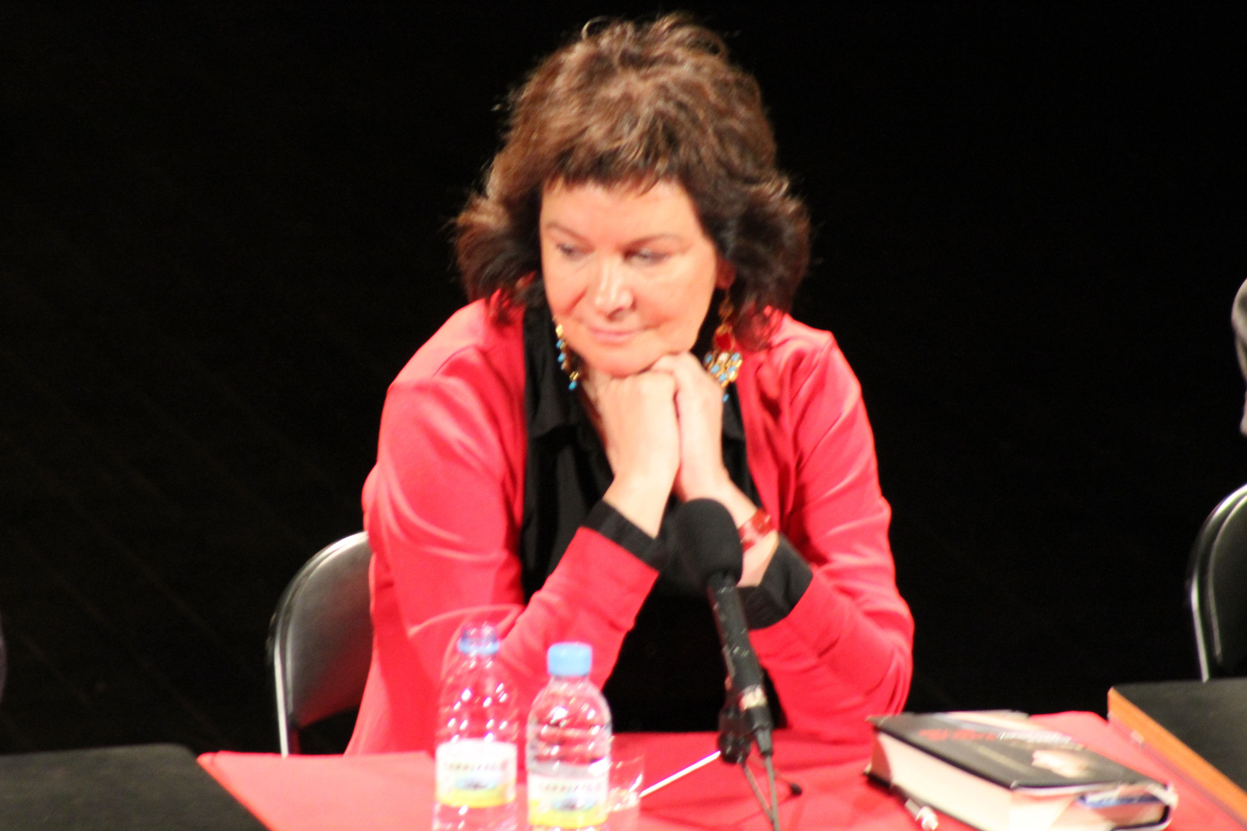 III Encuentros de Clubs de lectura de Asturias